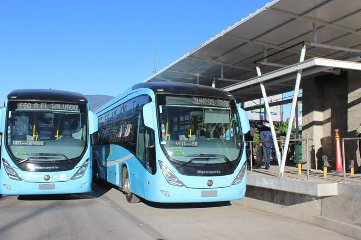 Estación del SSITRAMS